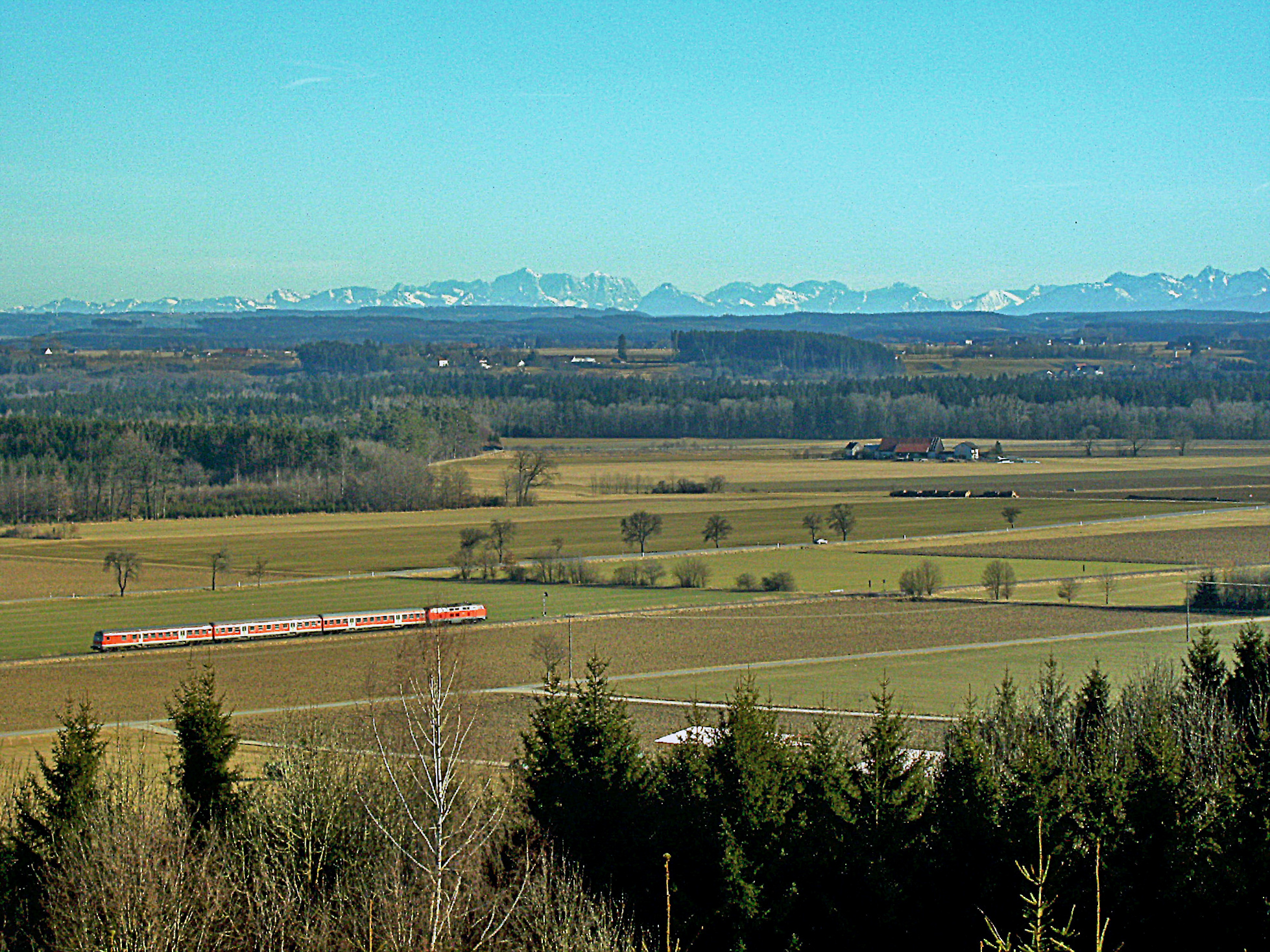 Bahnstrecke Memmingen-Leutkirch auf der Höhe Kronwinkel Mooshausen